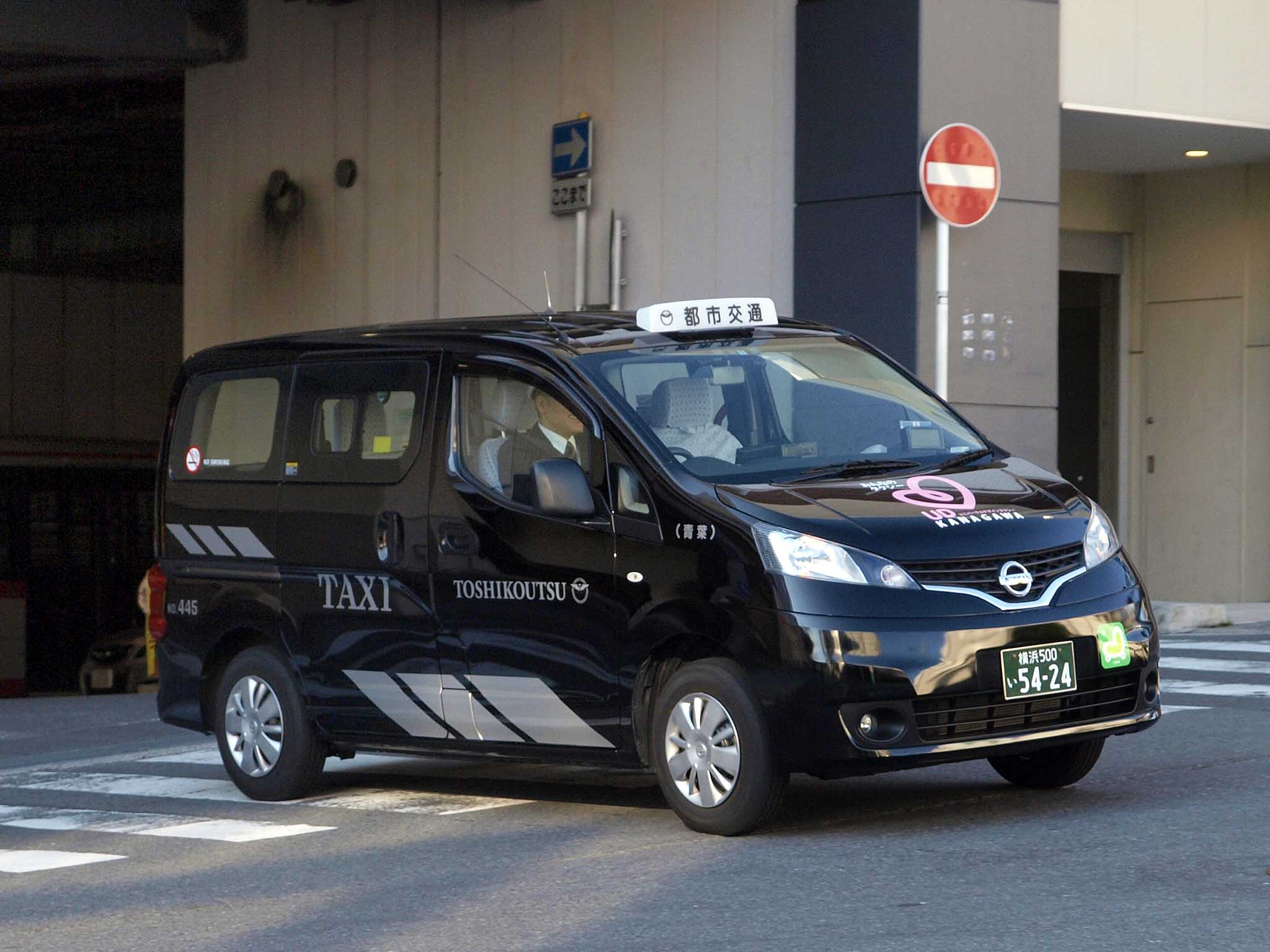 神奈川都市交通のユニヴァーサルデザインタクシー。 車種：日産・NV200バネット 登録番号：横浜500い5424 撮影地：神奈川県横浜市青葉区、たまプラーザ駅